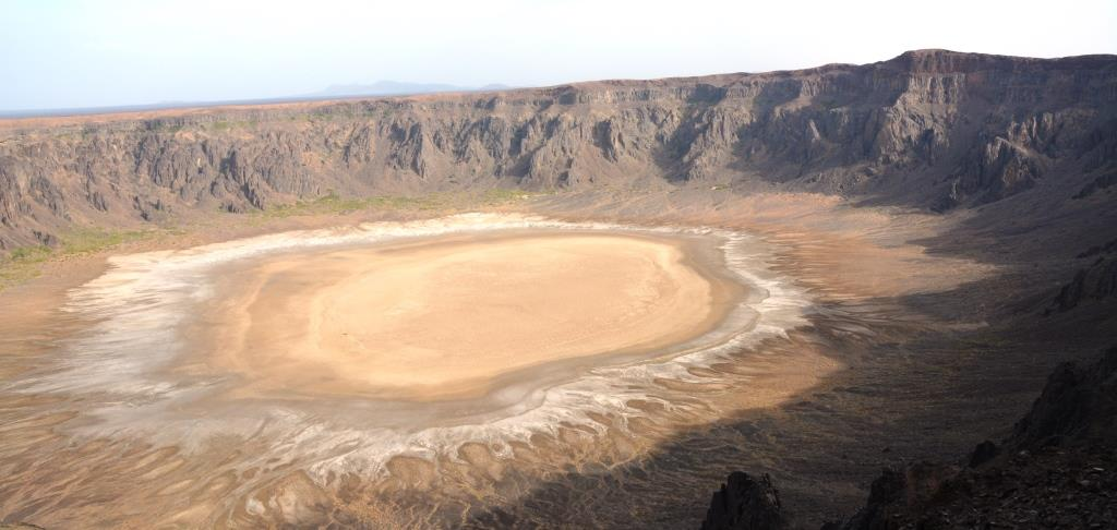 സൌദി അറേബ്യയിലെ വഹ്ബ എന്ന അഗ്നിപർവ്വത മുഖം